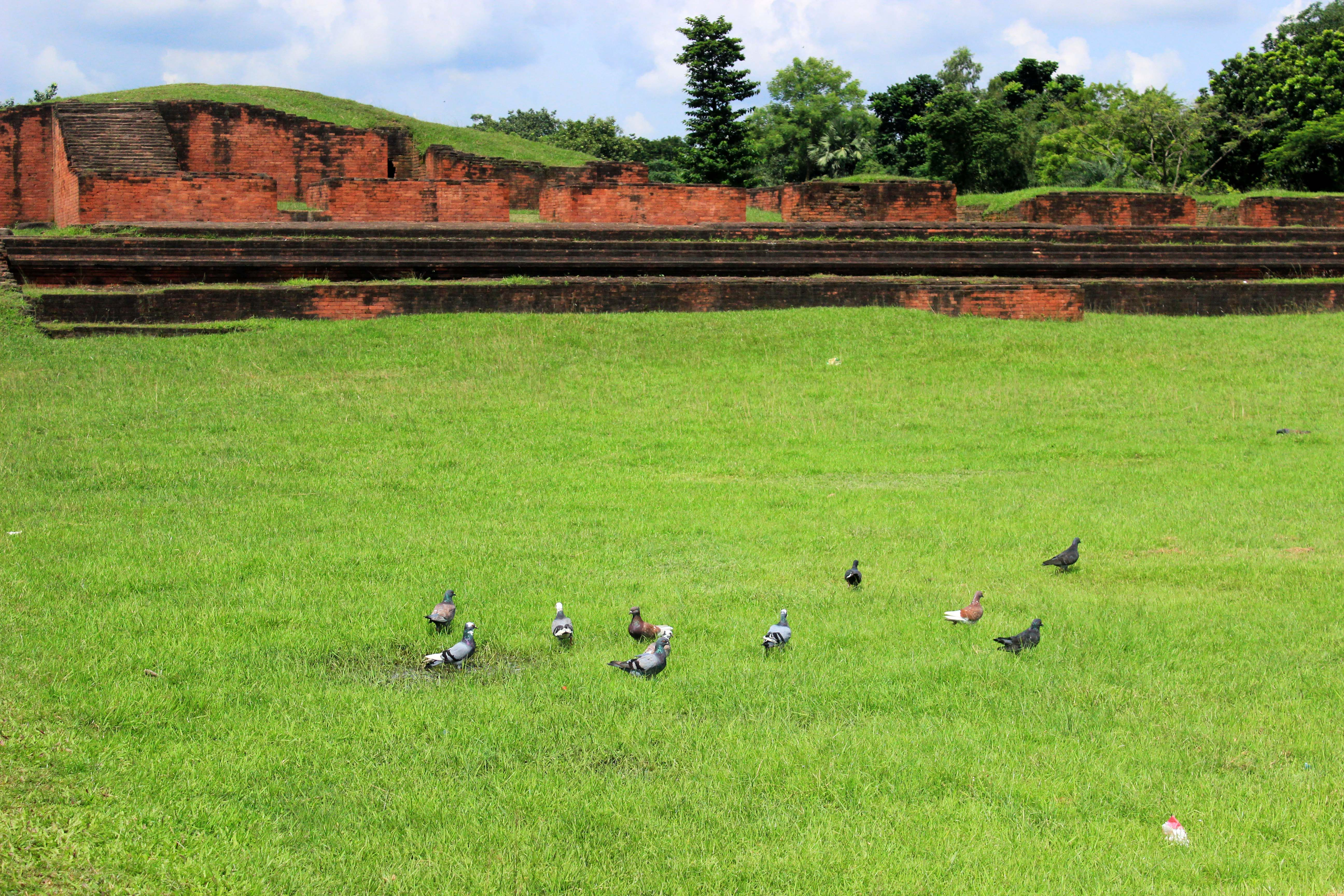 পাহাড়পুর বৌদ্ধ বিহার